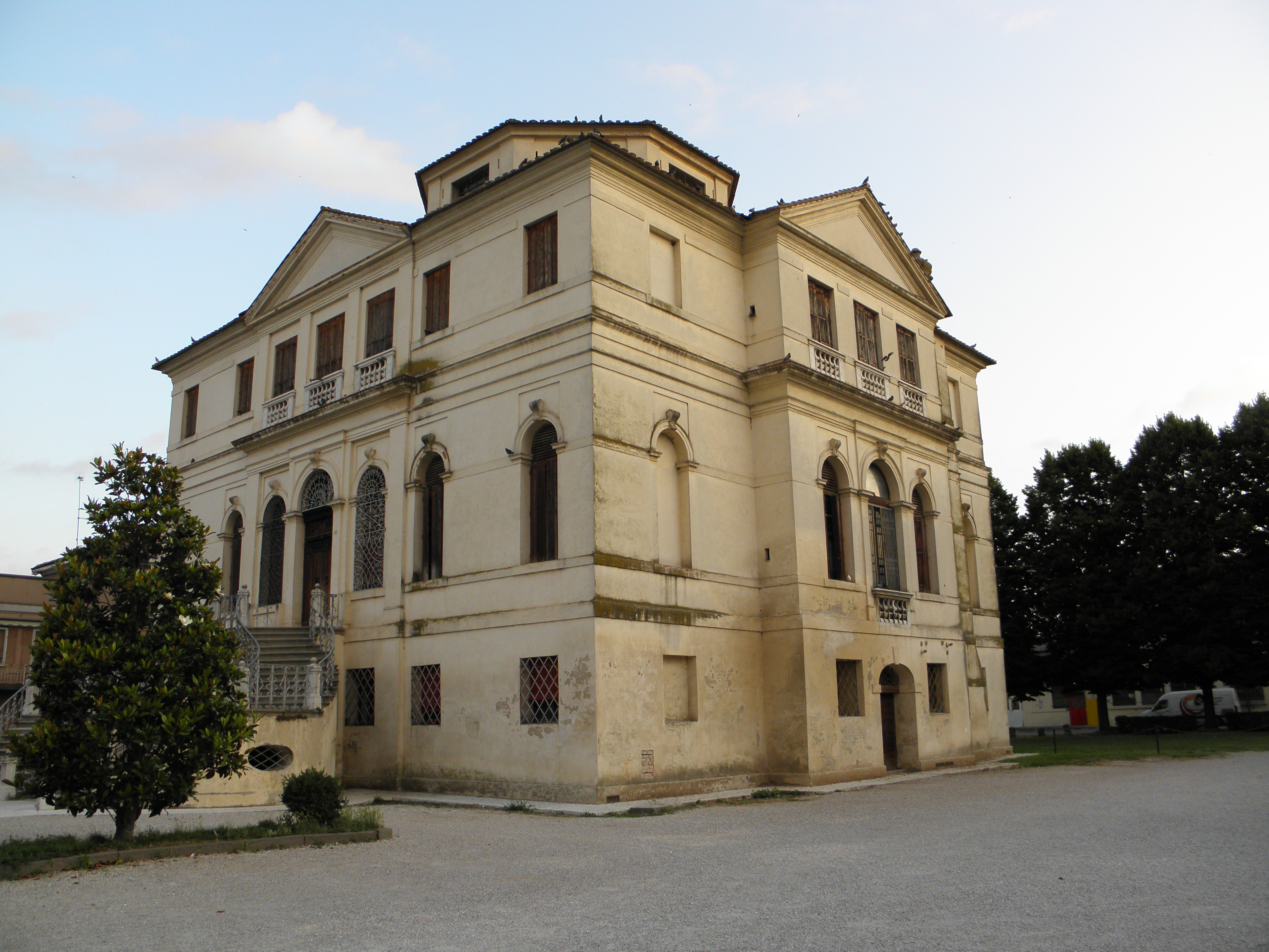 Fiesso Umbertiano: Villa Morosini Vendramin Calergi, nota più semplicemente come Villa Vendramin, ora sede municipale.